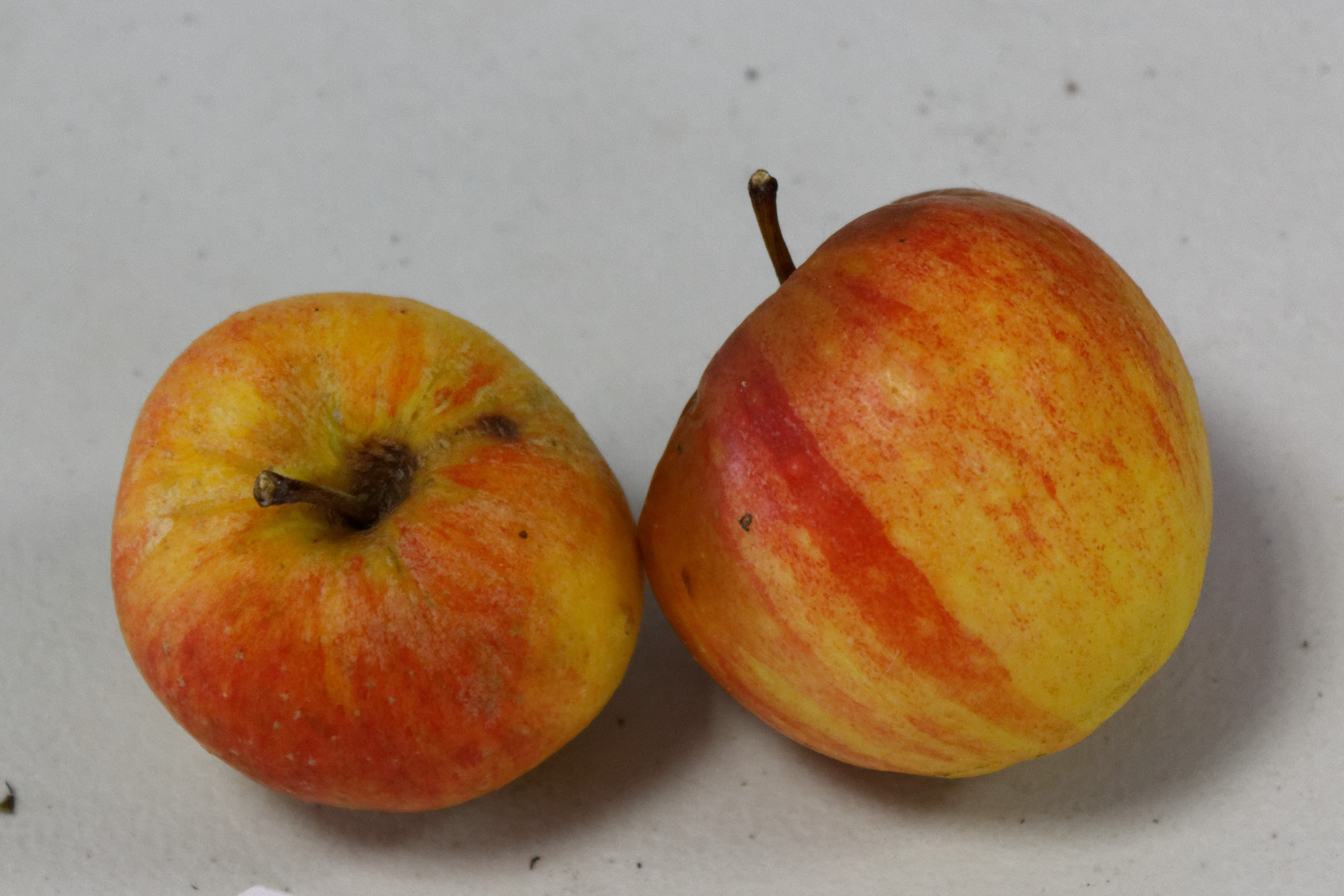 Pomme photographiée à l'OPL Peillac/Les Fougerêts.